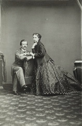 Барон Фредерикс, Лев Александрович (1839—1914) с женой Варварой Андреевной (1843—1903; урож. Арапова)